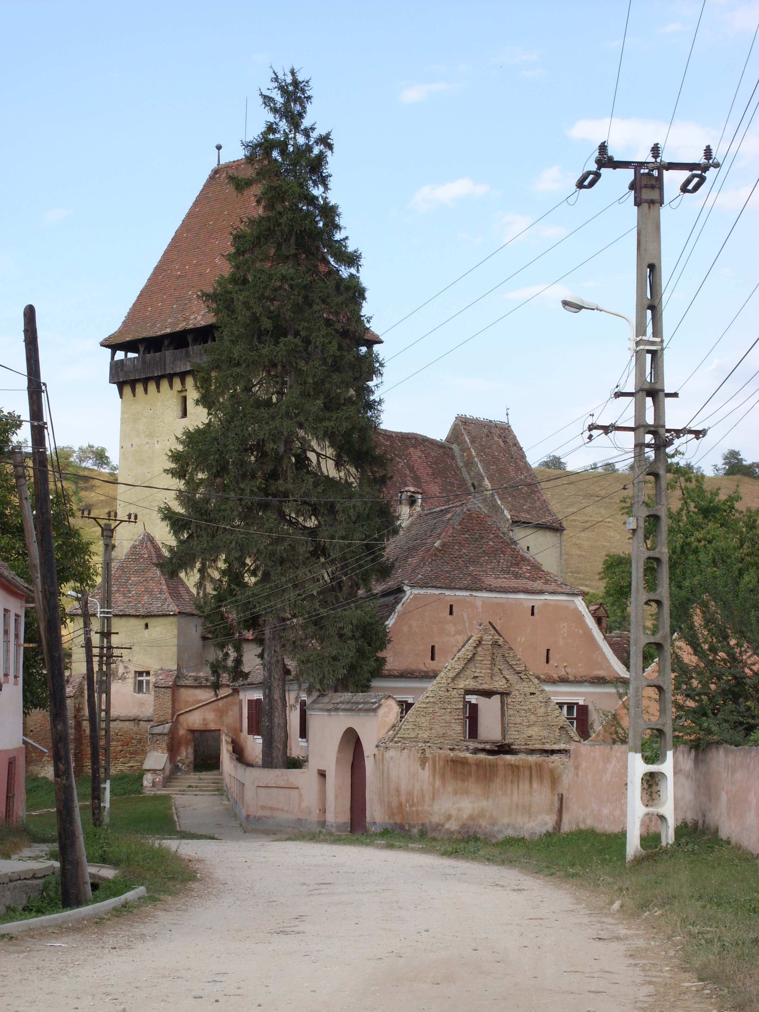 Saxon Lutheran fortified church in Ighișu Nou/Sächsisch-Eibesdorf, Romania